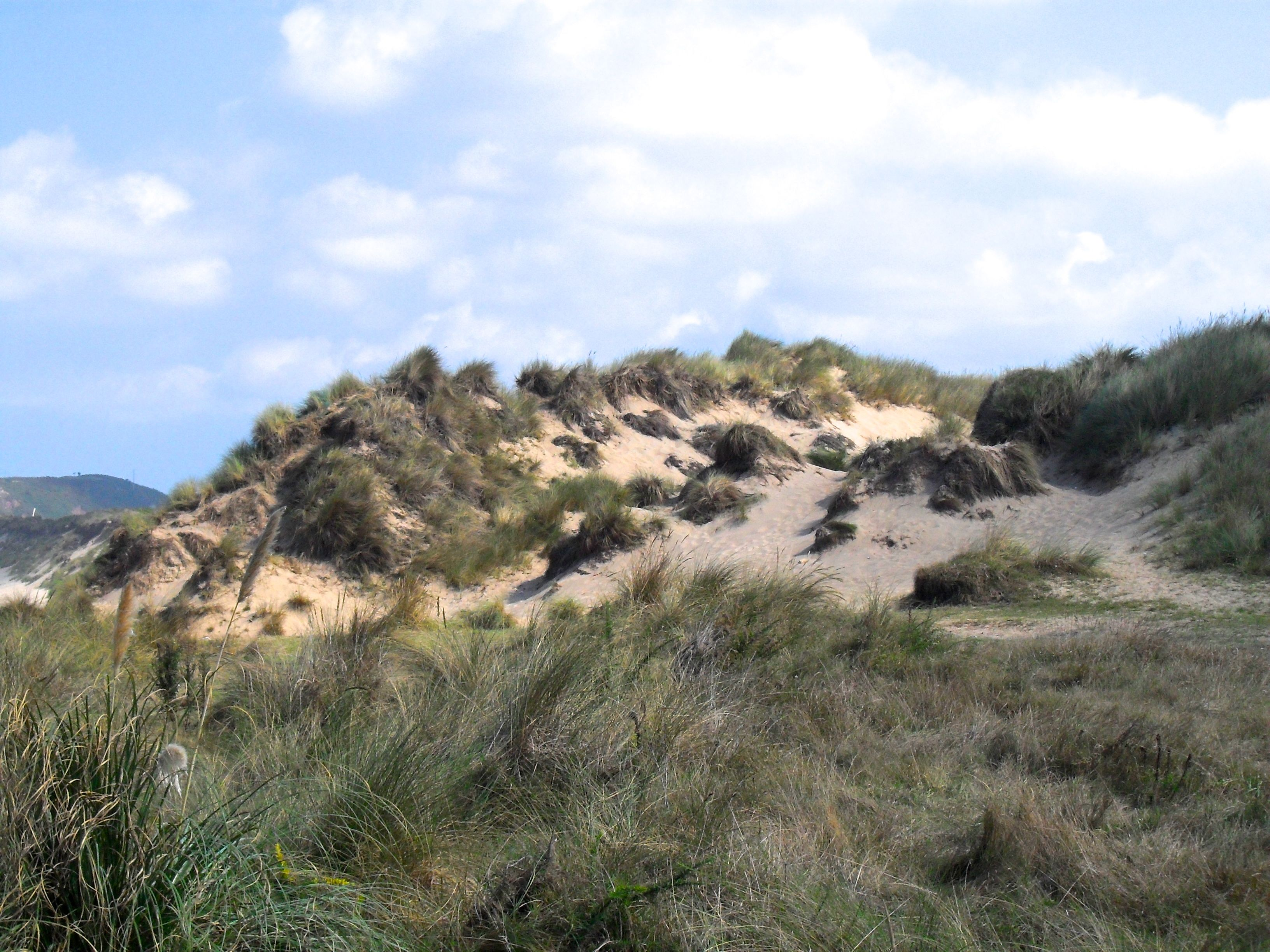 Duna primaria en el extremo oeste de la playa de El Espartal (Castrillón, Asturias, España)